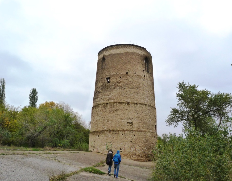 Вітовтова вежа в селі Веселому